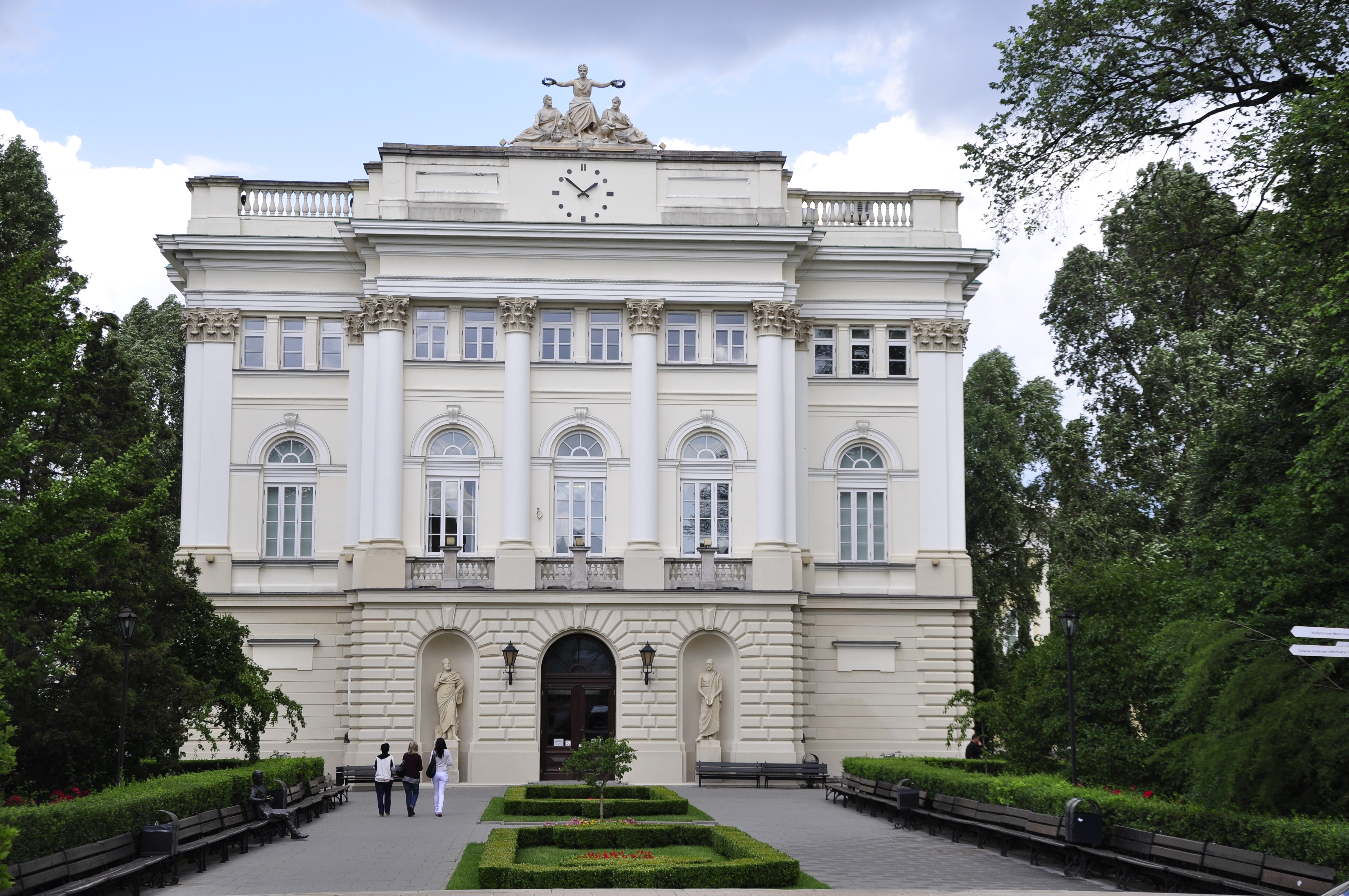 Warschau, Campus der Universität Warschau